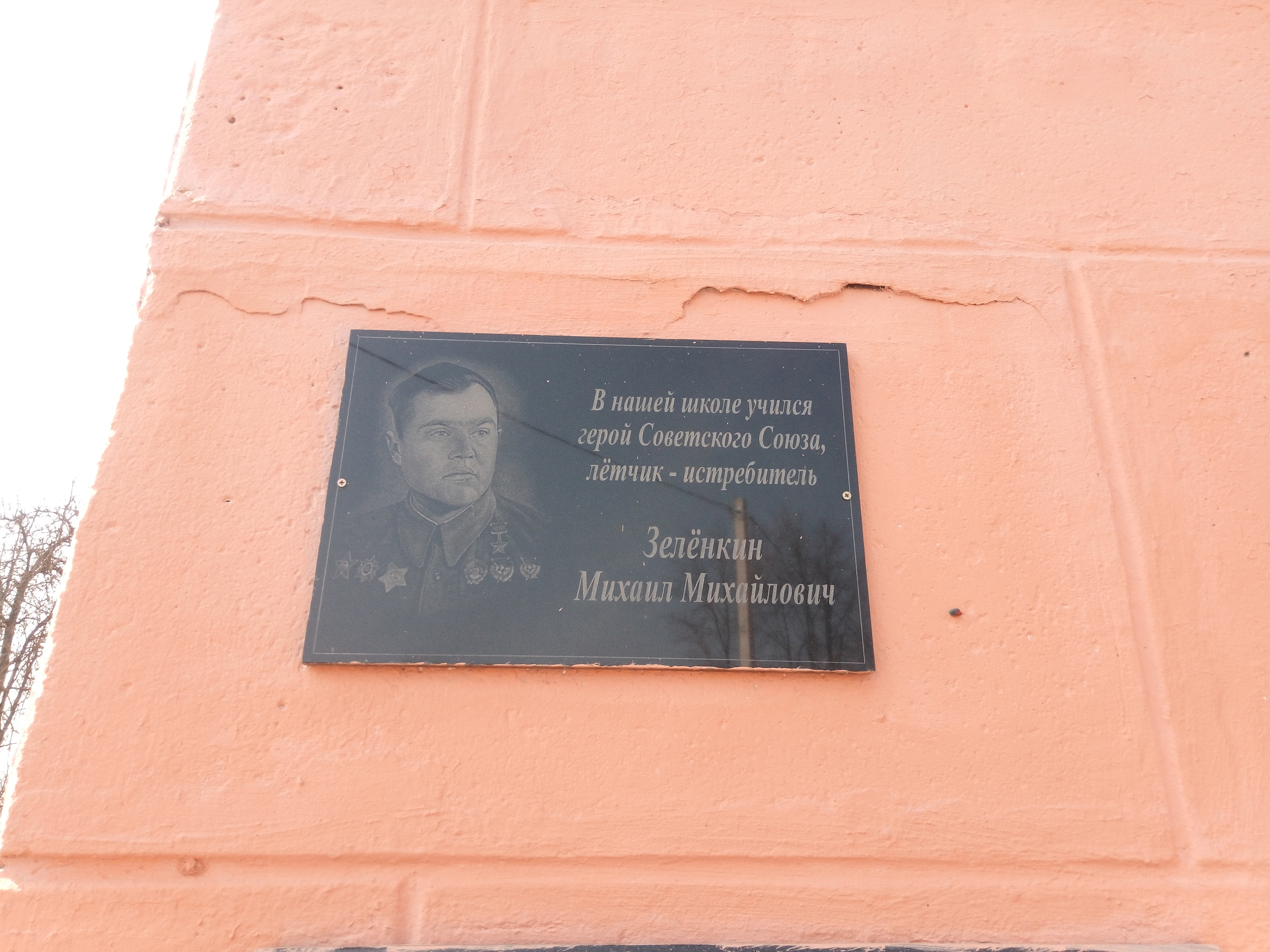 Памятная таблічка на Рудзенскай школе ў гонар Герой Савецкага Саюза Міхала Зялёнкіна.